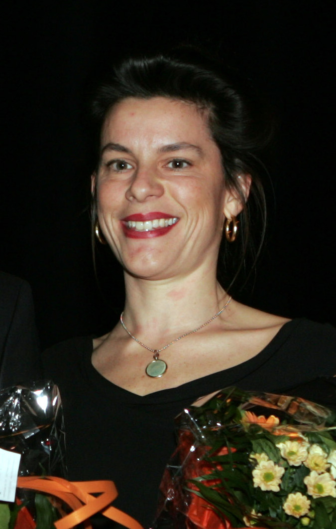 Anna Anthony vinnare av Nordiska rådets filmpris 2006.